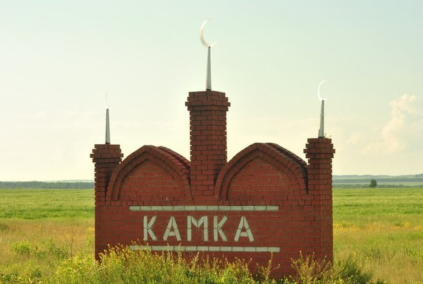 Камкино